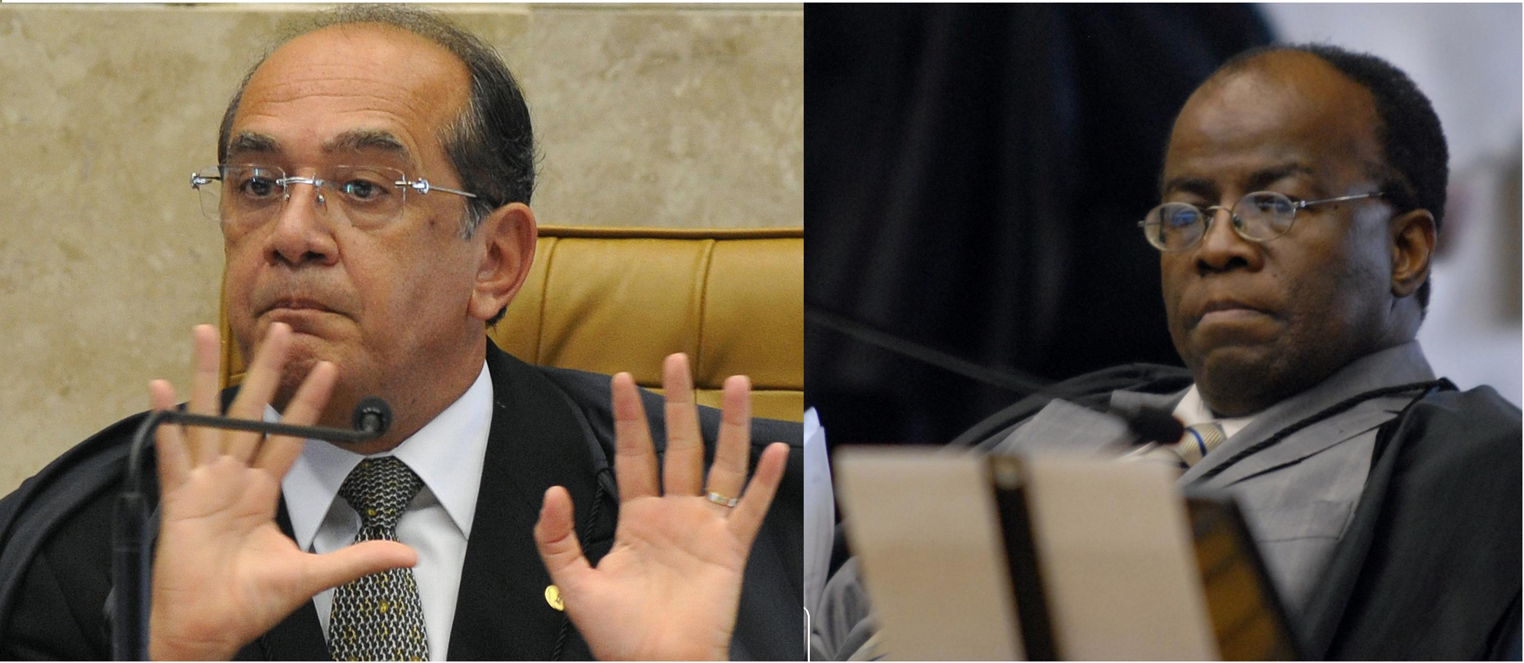 Montagem sobre fotos de Gilmar Mendes e Joaquim Barbosa, ministros do Supremo Tribunal Federal.